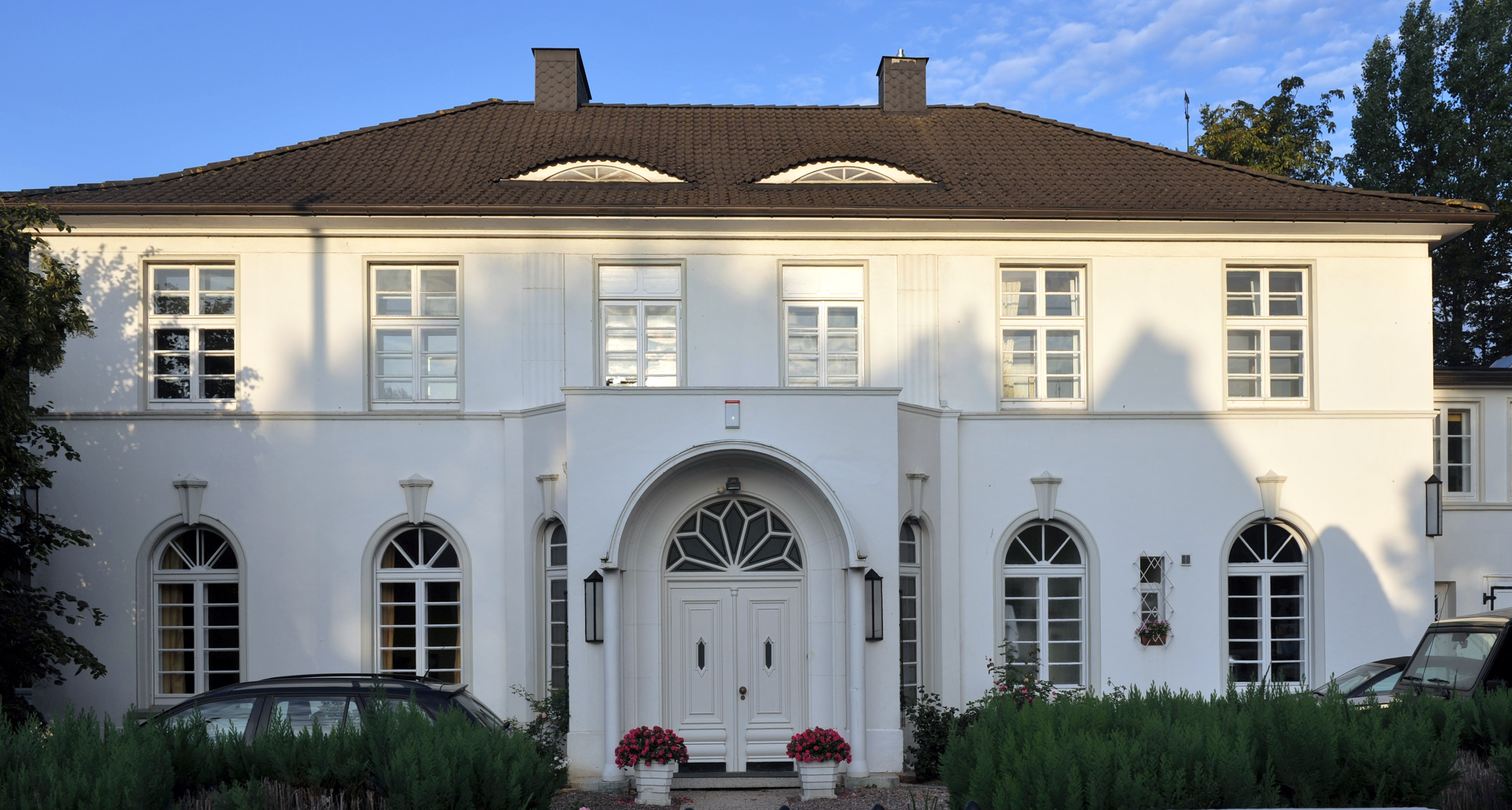 Historical building in Bremerhaven, northern Germany Villa Weber, Wurster Straße 99, 1927 von Maassen & Witte Das abgebildete Objekt ist ein geschütztes Kulturdenkmal in der Freien Hansestadt Bremen, mit der Nr. 1587 beim Landesamt für Denkmalpflege registriert.